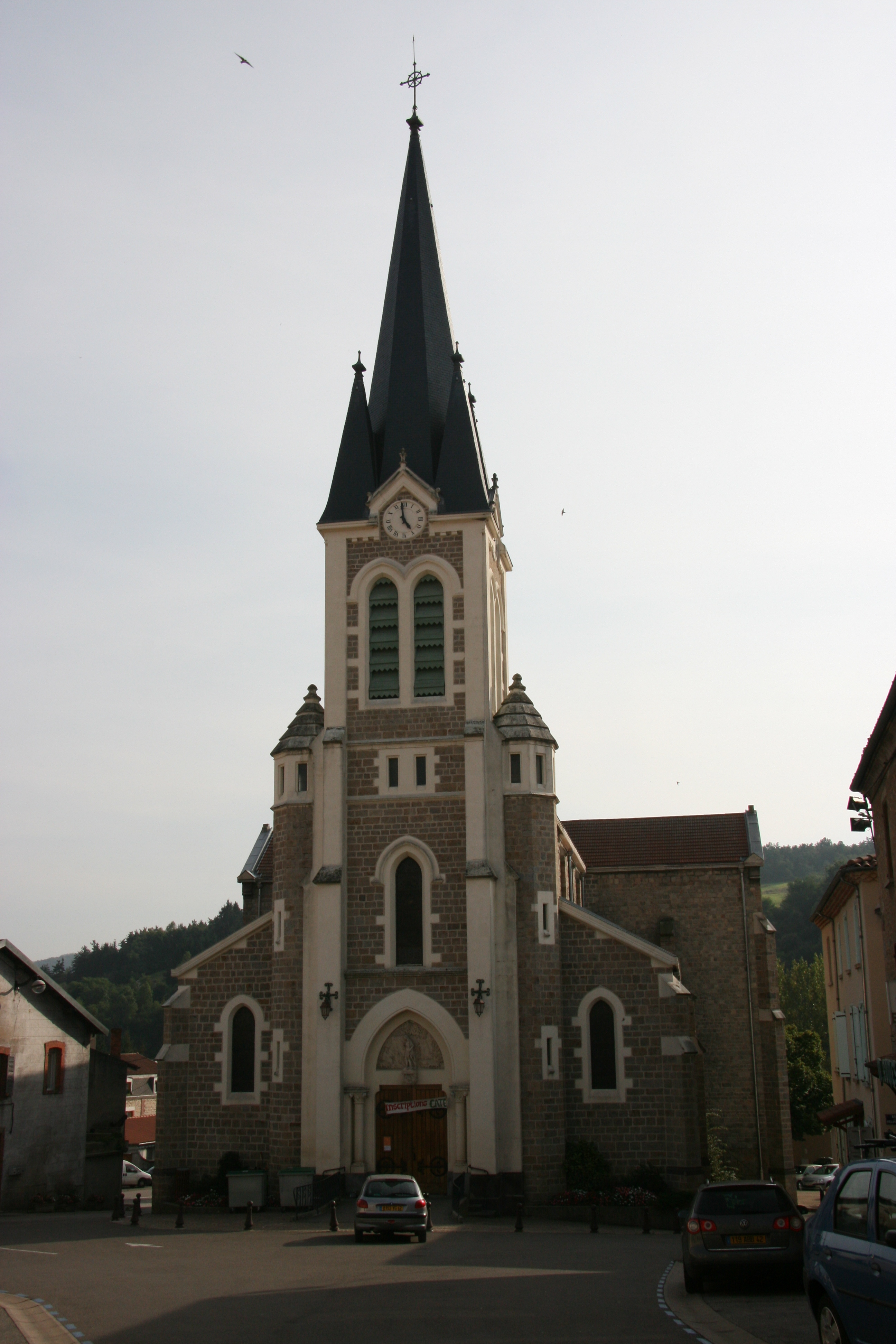 Eglise Saint Jean-Baptiste. Boën, (ou Boën-sur-Lignon) commune du département de La Loire, France